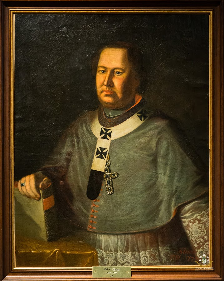 Klimó György pécsi püspök.